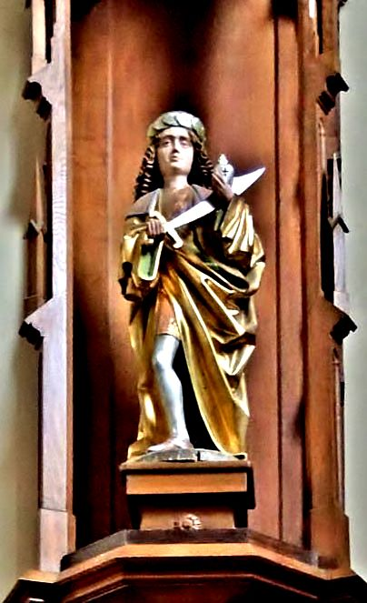 Statue de Saint Pancrace, dans l'église d'Husseren-les-Châteaux. Haut-Rhin